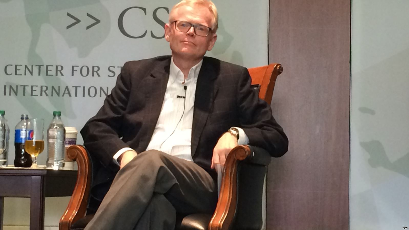 Ian Denis Johnson